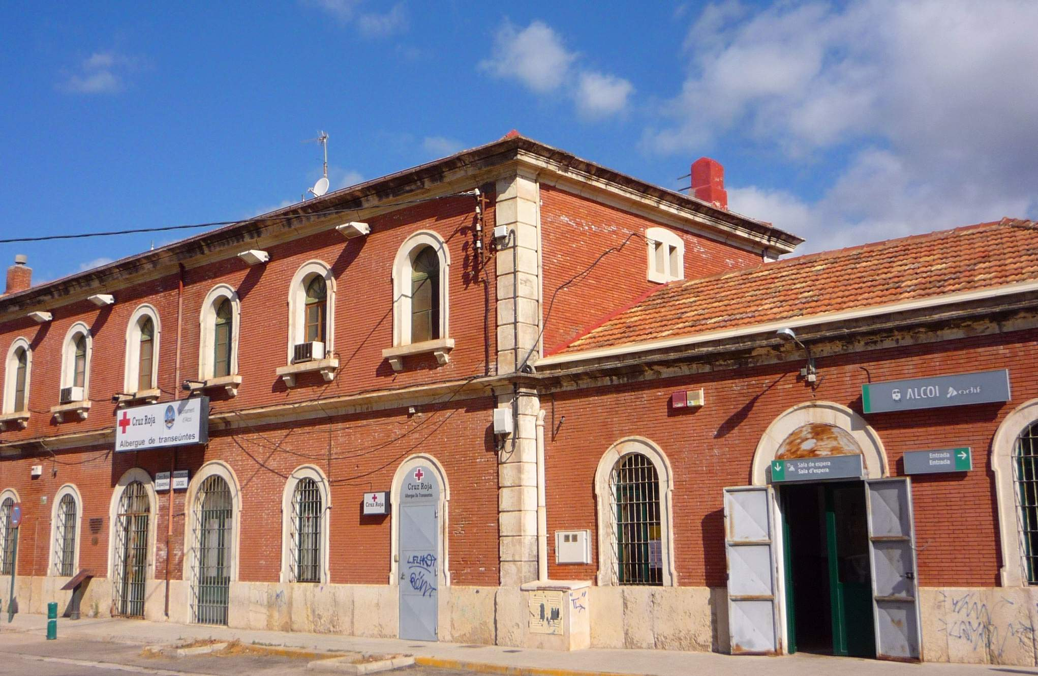 Alcoy - Estación de Adif